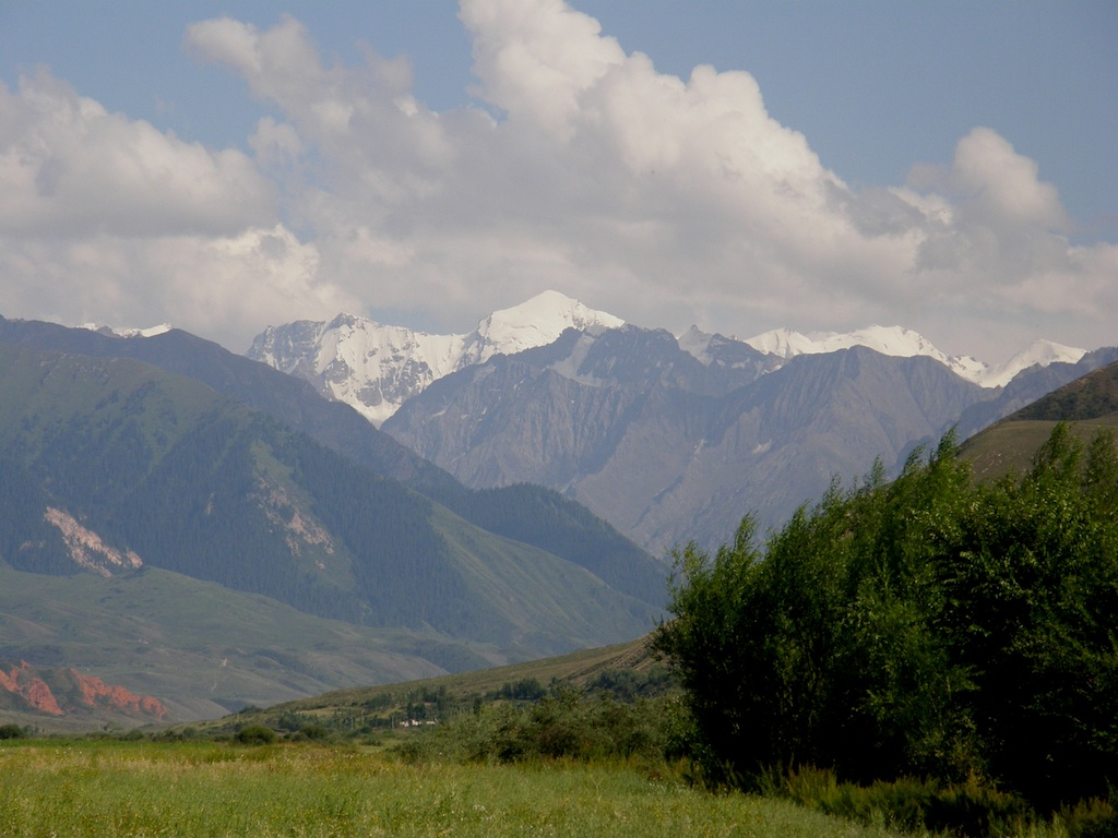 Tian Shan Mountains